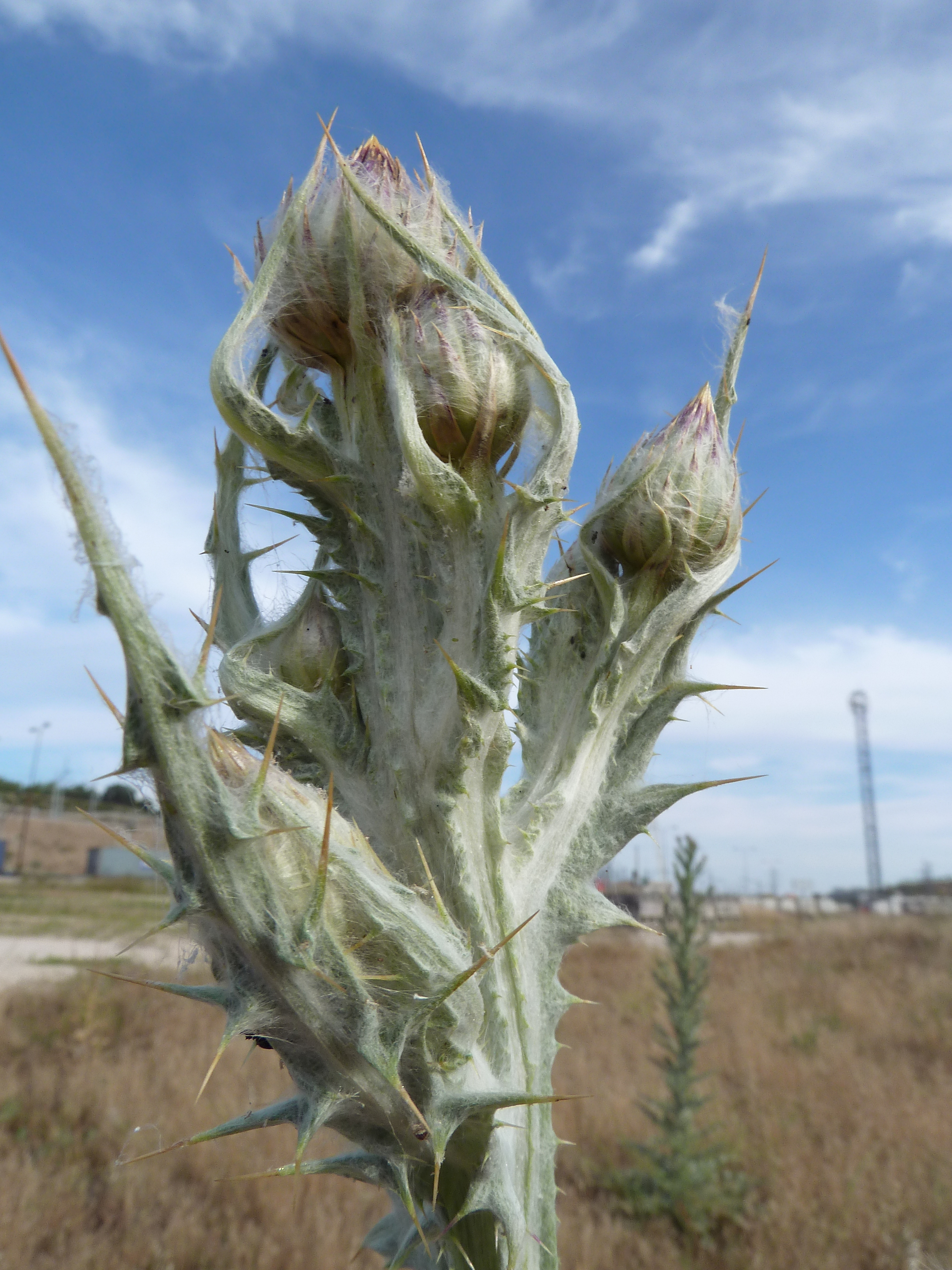 Onopordum nervosum - (Cardo gigante) - Capítulos apicales aracnoideo-tomentosos en preantesis en un individuo joven. - Circa Estación de Contenedores de RENFE-ADIF de Abroñigal/Embajadores, Madrid